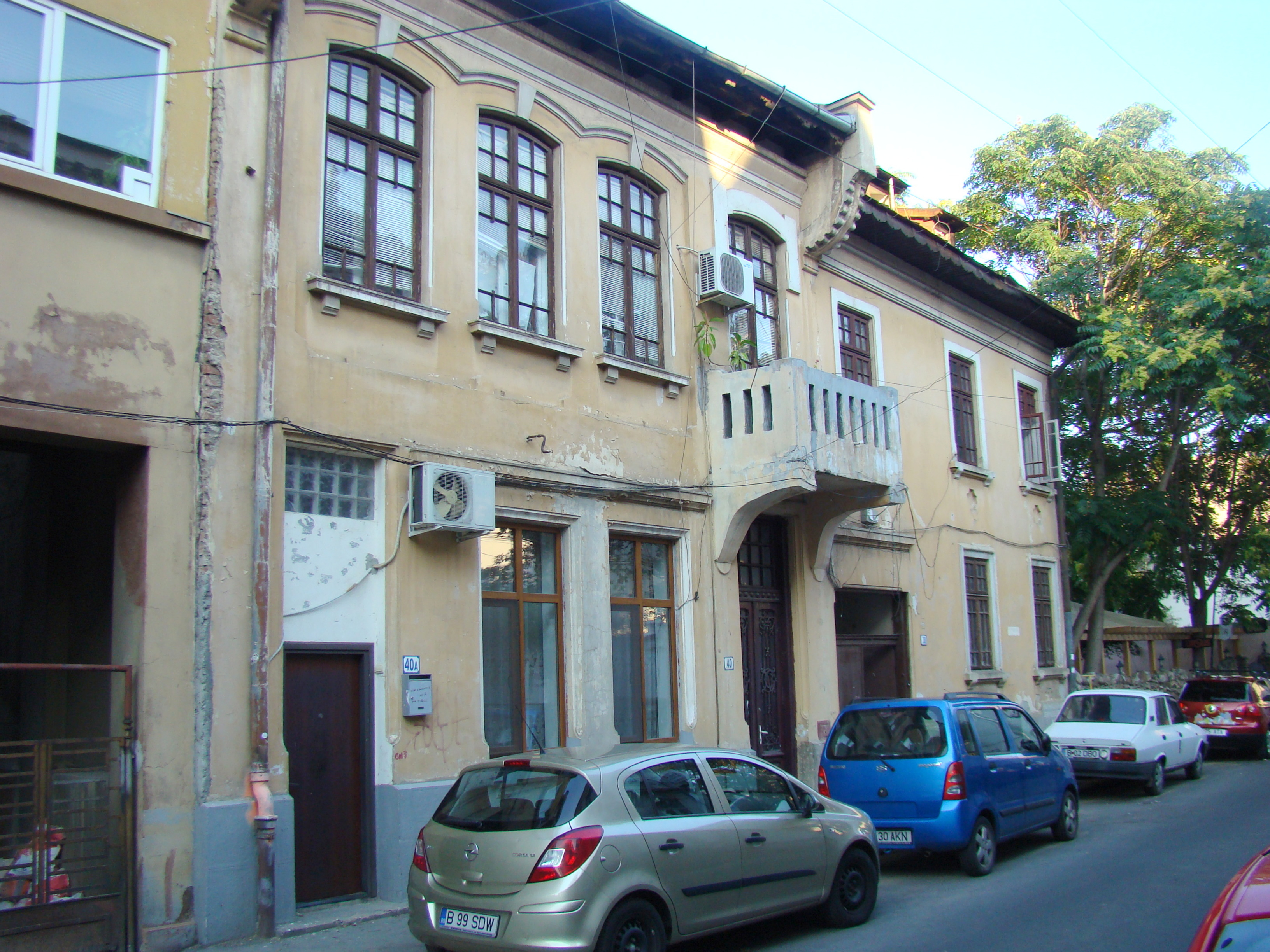 Casă monument istoric, str. Theodor Aman, nr.40